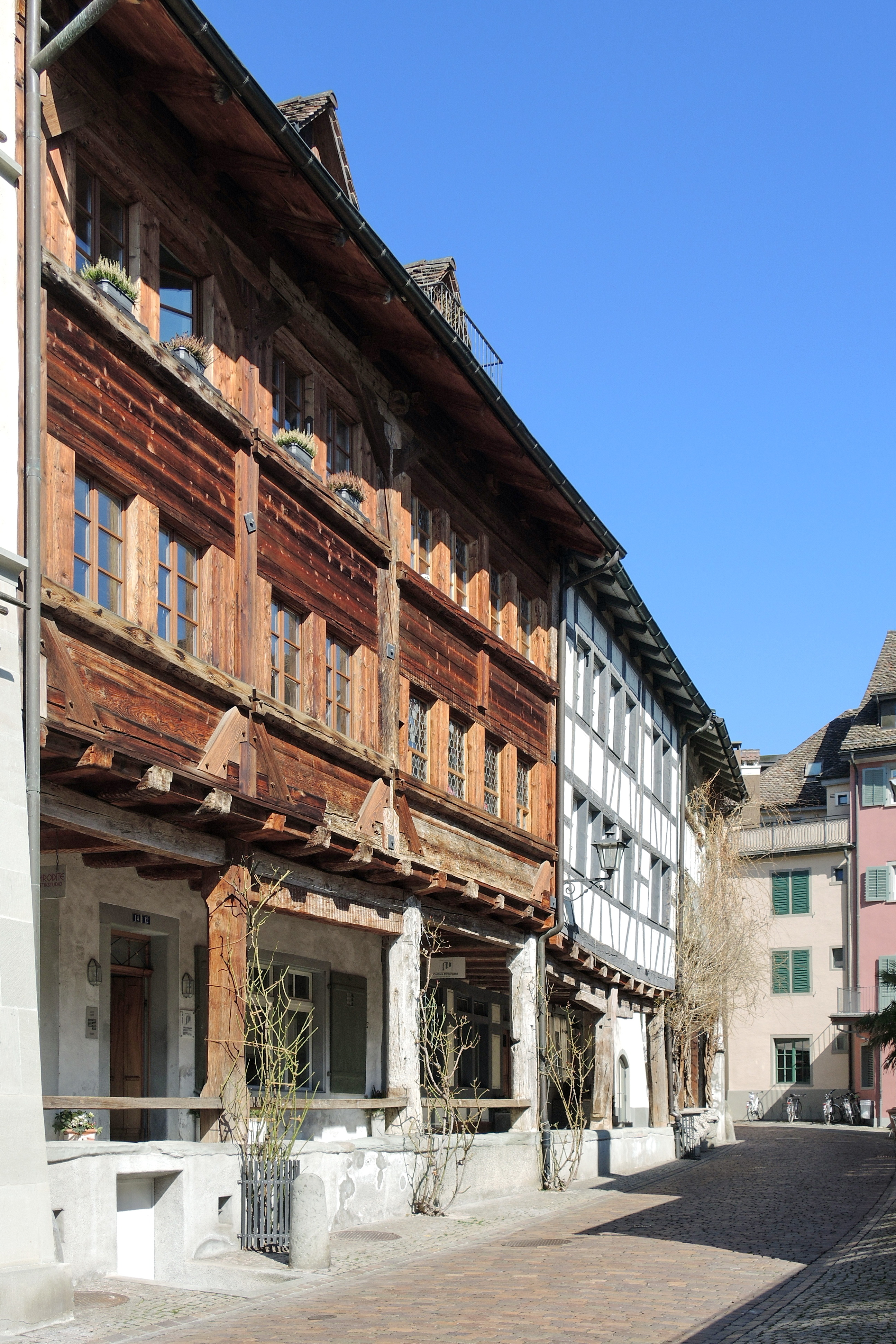 Hintergasse in Rapperswil (Switzerland)